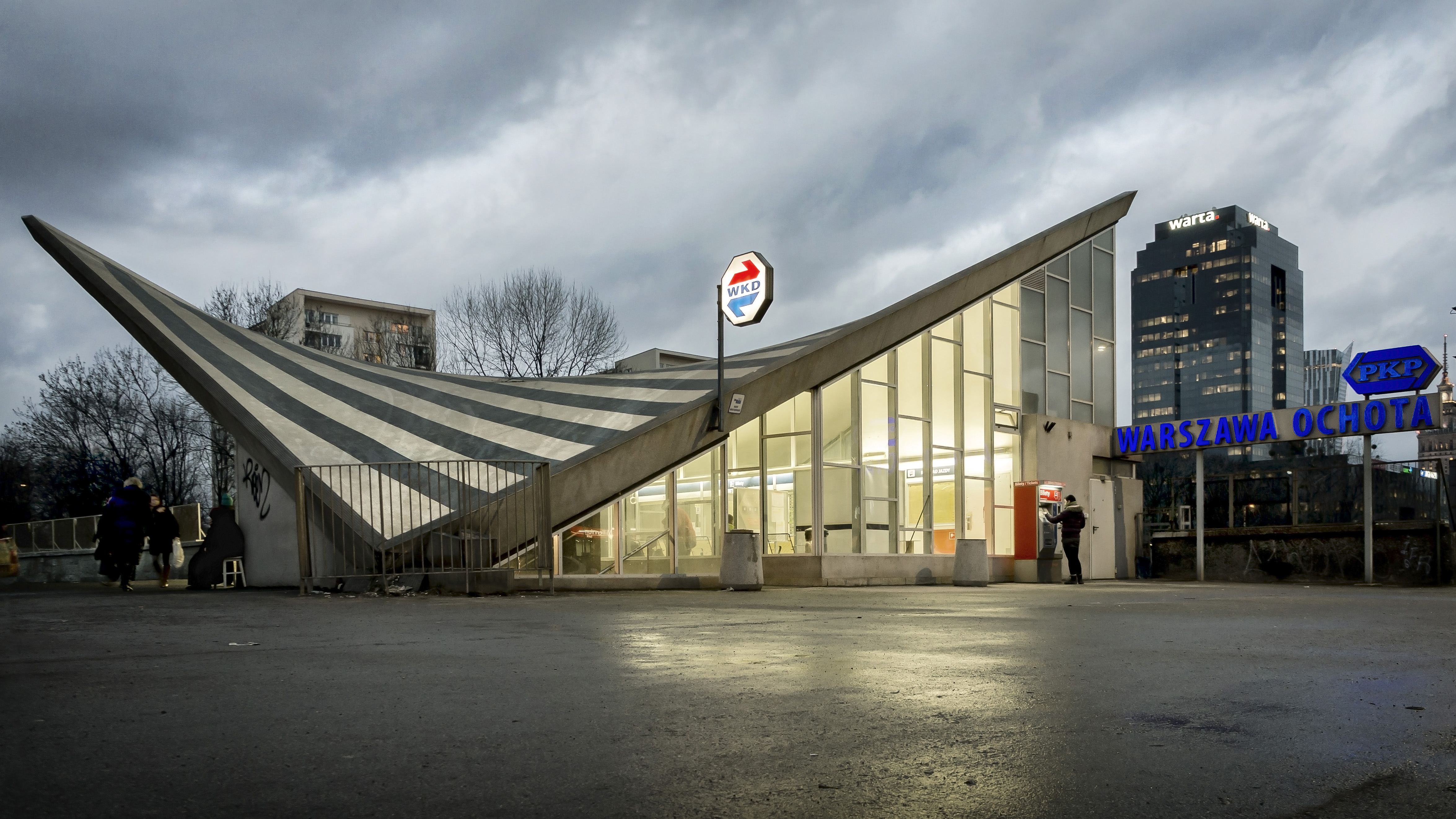 Stacja Kolejowa Warszawa Ochota, zaprojektowana przez Aresniusza Romanowicza i Piotra Szymaniaka, zbudowana w 1962